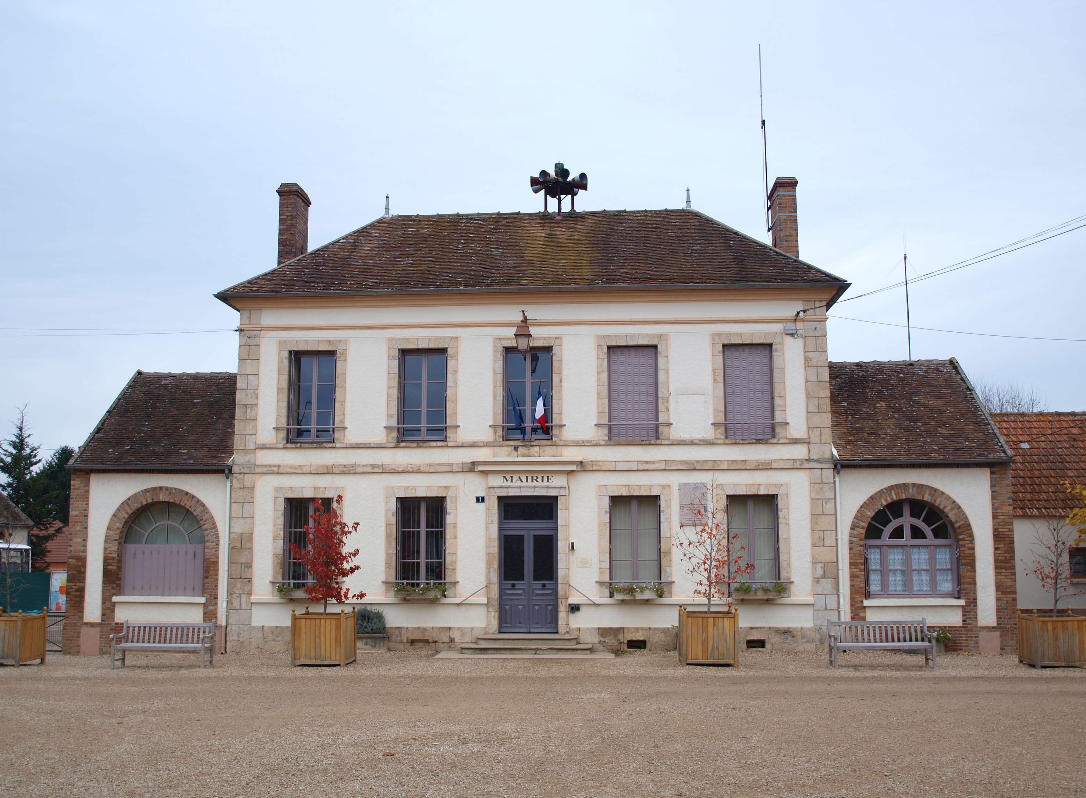 Champigny (Yonne, France) ; mairie